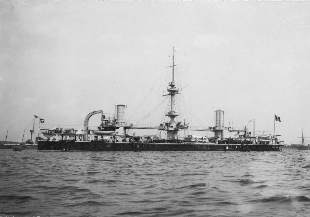 vor Holtenau zur Eröffnung des Kaiser-Wilhelm-Kanals.